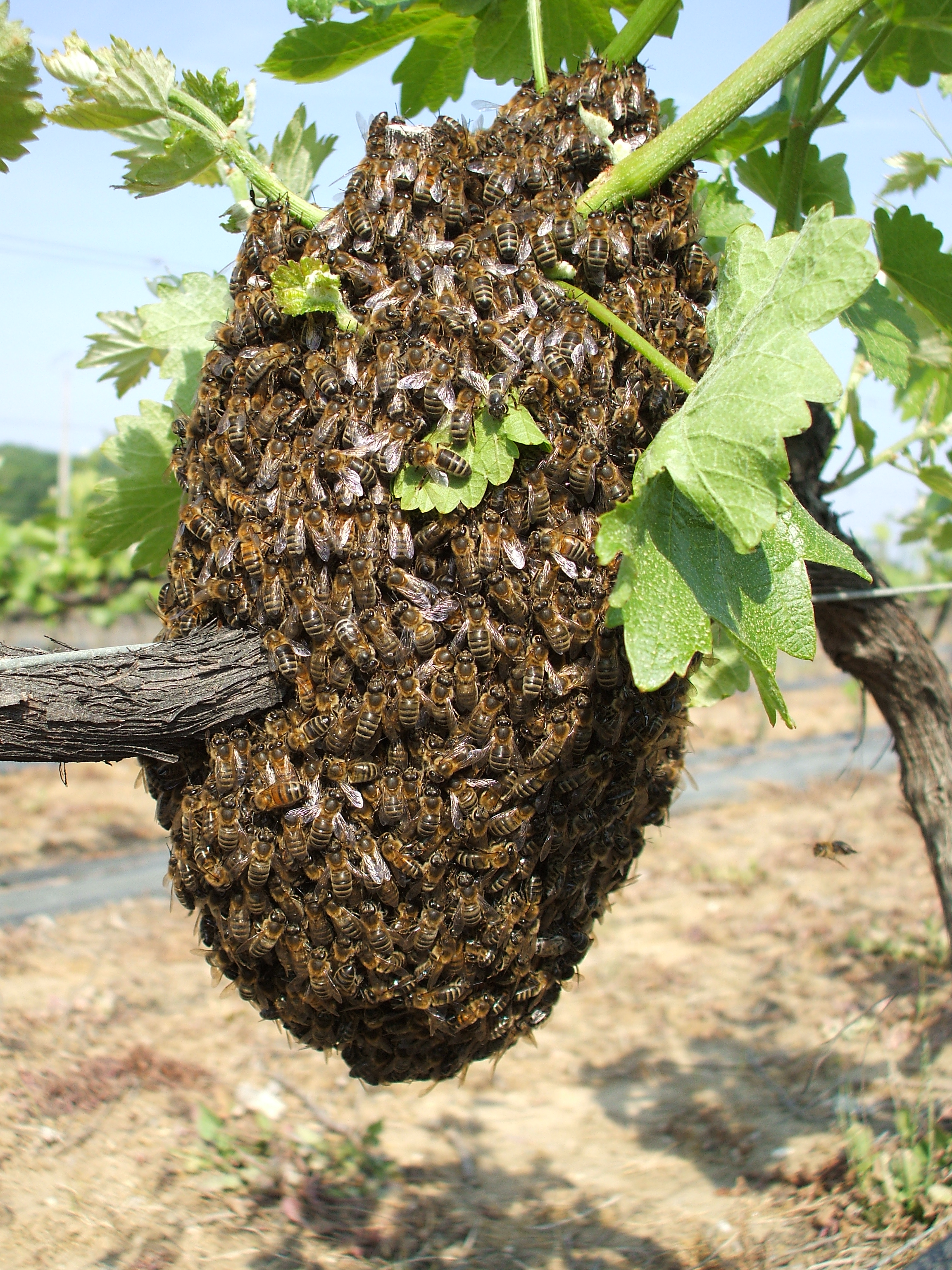 essaim.